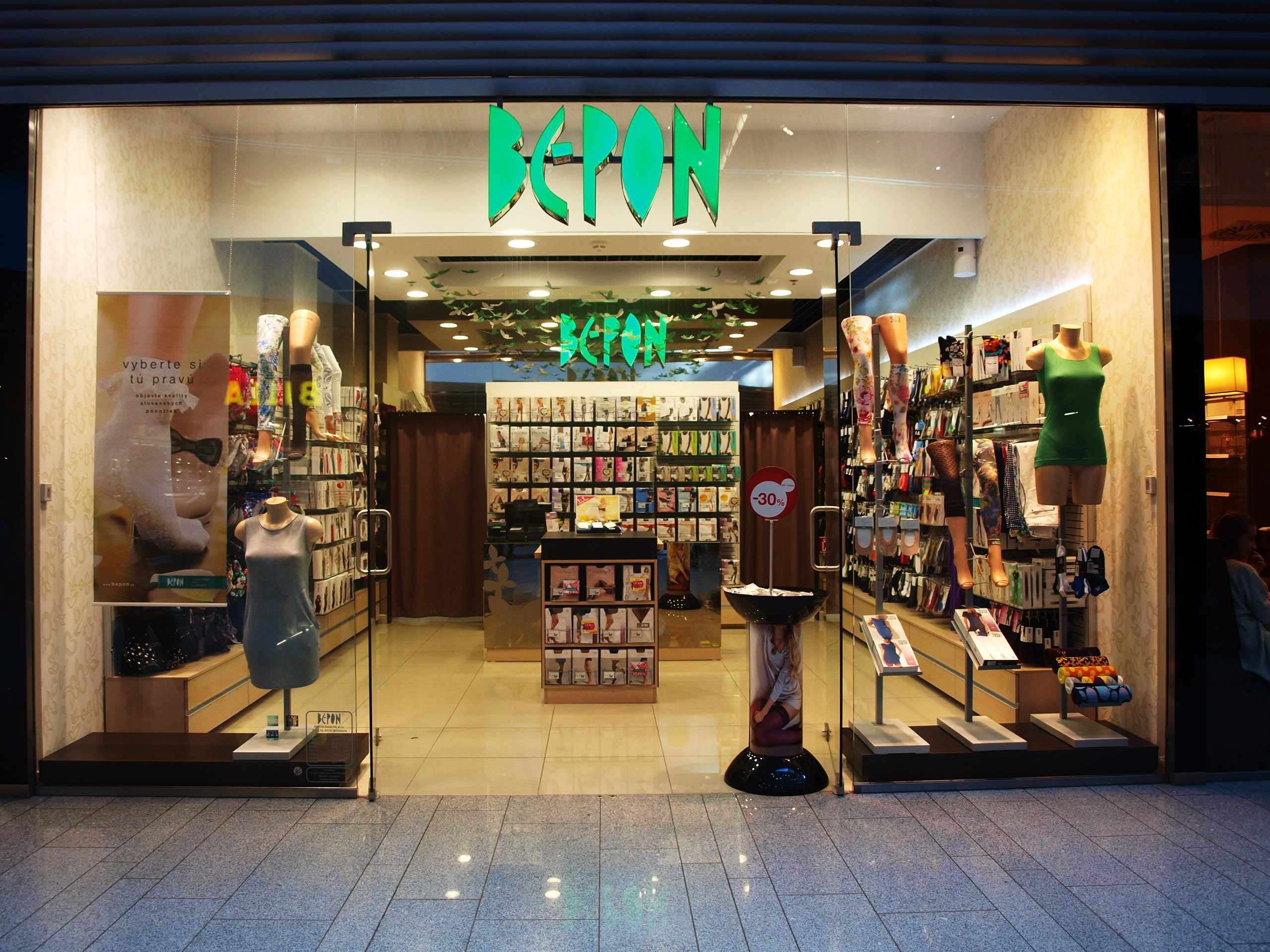 Predajňa v OC Centrál